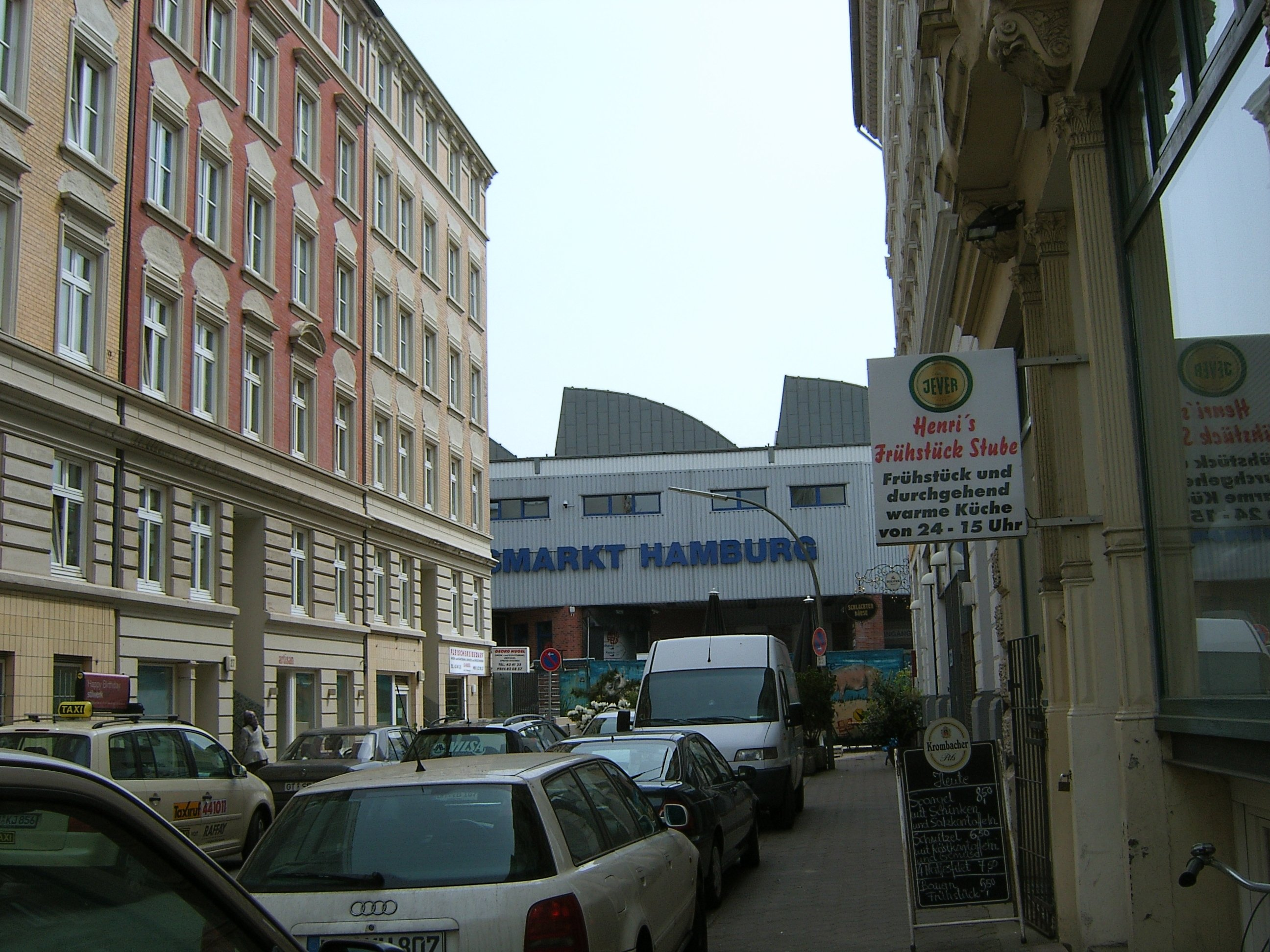 Die Kampstraße im Schanzenviertel führt auf den Fleischgroßmarkt zu, der schon auf St. Pauli liegt. Rechts liegt mit „Henri's Frühstück Stube“ eines der im Umfeld des Fleischgroßmarktes üblichen Frühstücksrestaurants.